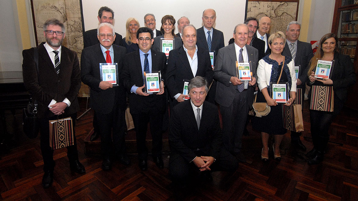 I premiati della seconda edizione del Premio L'Italiano